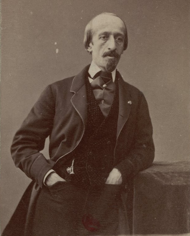 Le Baron Charles Gustave Martin de Chassiron (1818- 1871) (see Charles Gustave Martin de Chassiron